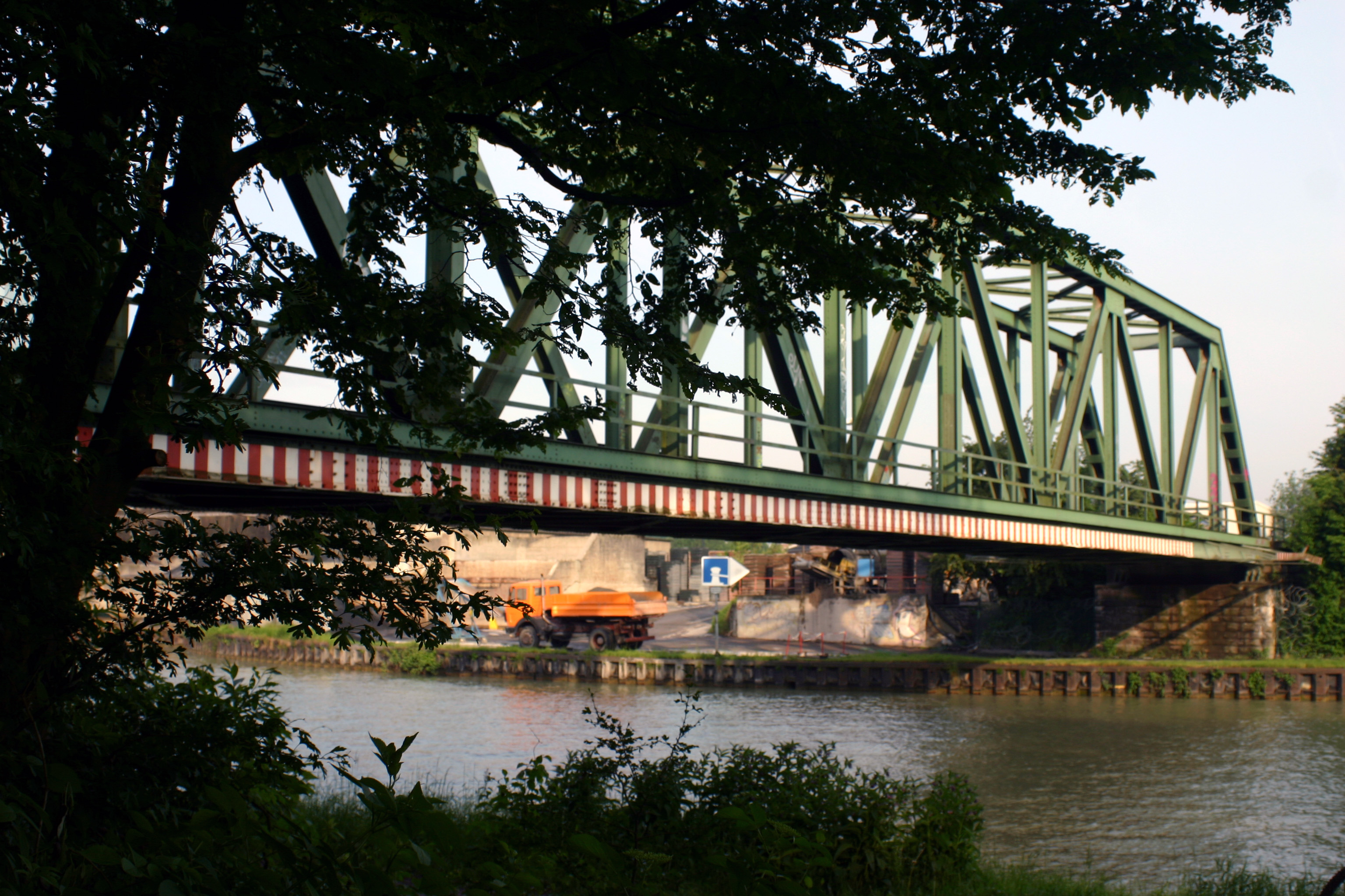 Brücke der Westfälischen Landeseisenbahn (WLE) über den Dortmund-Ems-Kanal in Münster